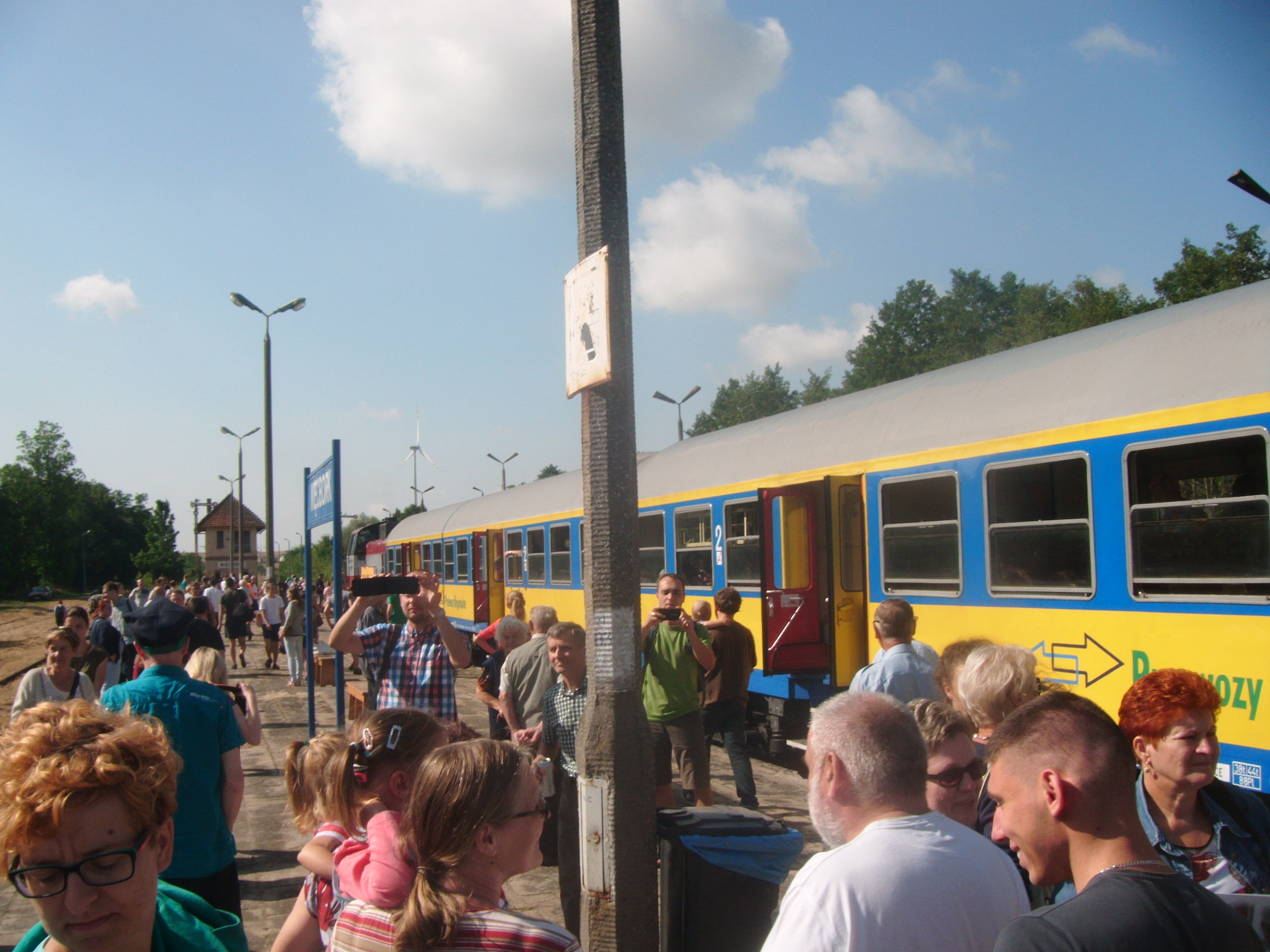 Stacja PKP Więcbork LK 281 festyn kolejowy przygotowany przez firmę PHU LORD Tomasz Bracka z Więcborka - 2015 r.